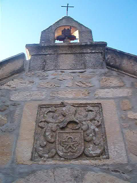 Licença